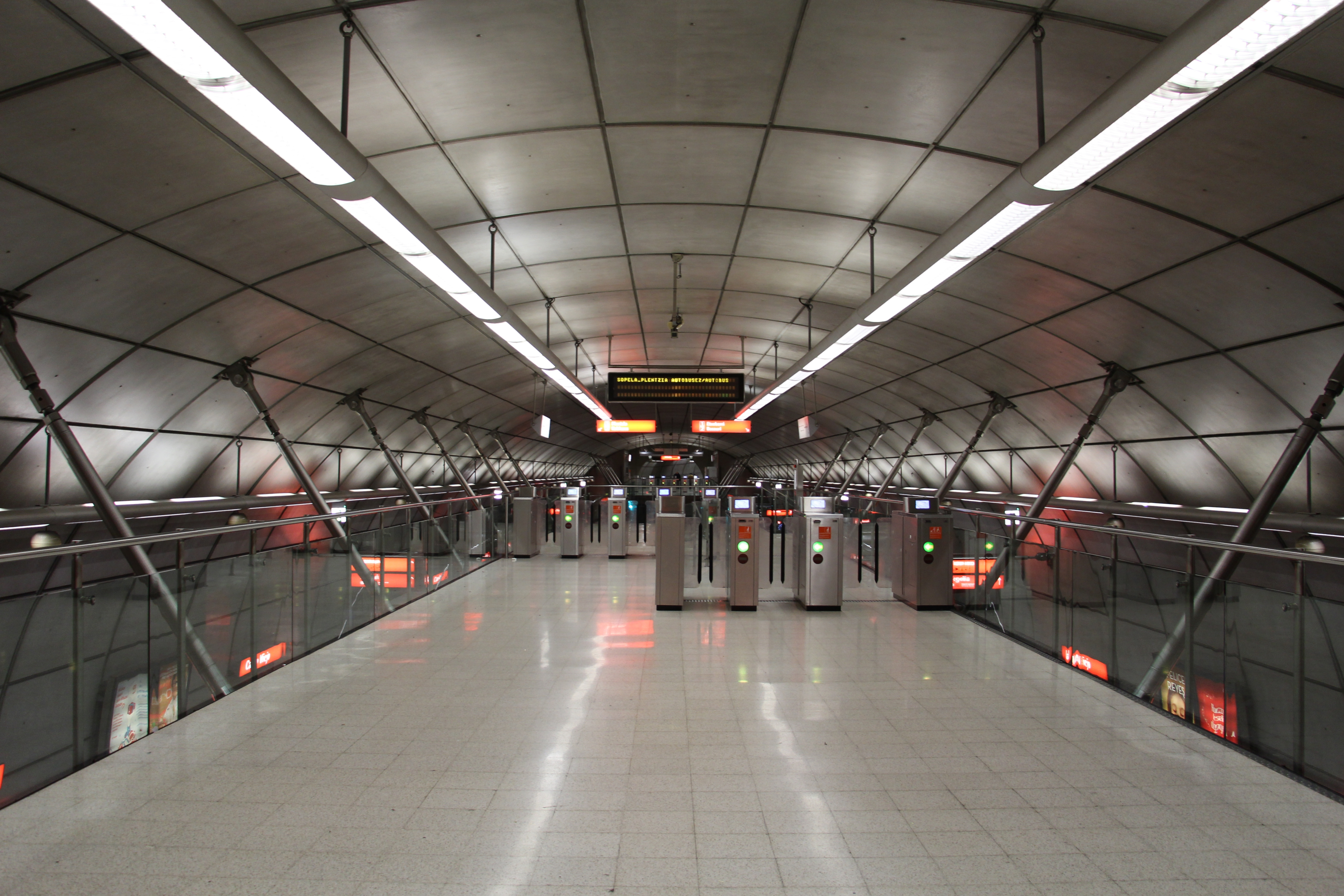 (Zazpi Kaleak) Miguel Unamuno Plaza Casco Viejo Metro station. Arch. Norman Foster 1995.